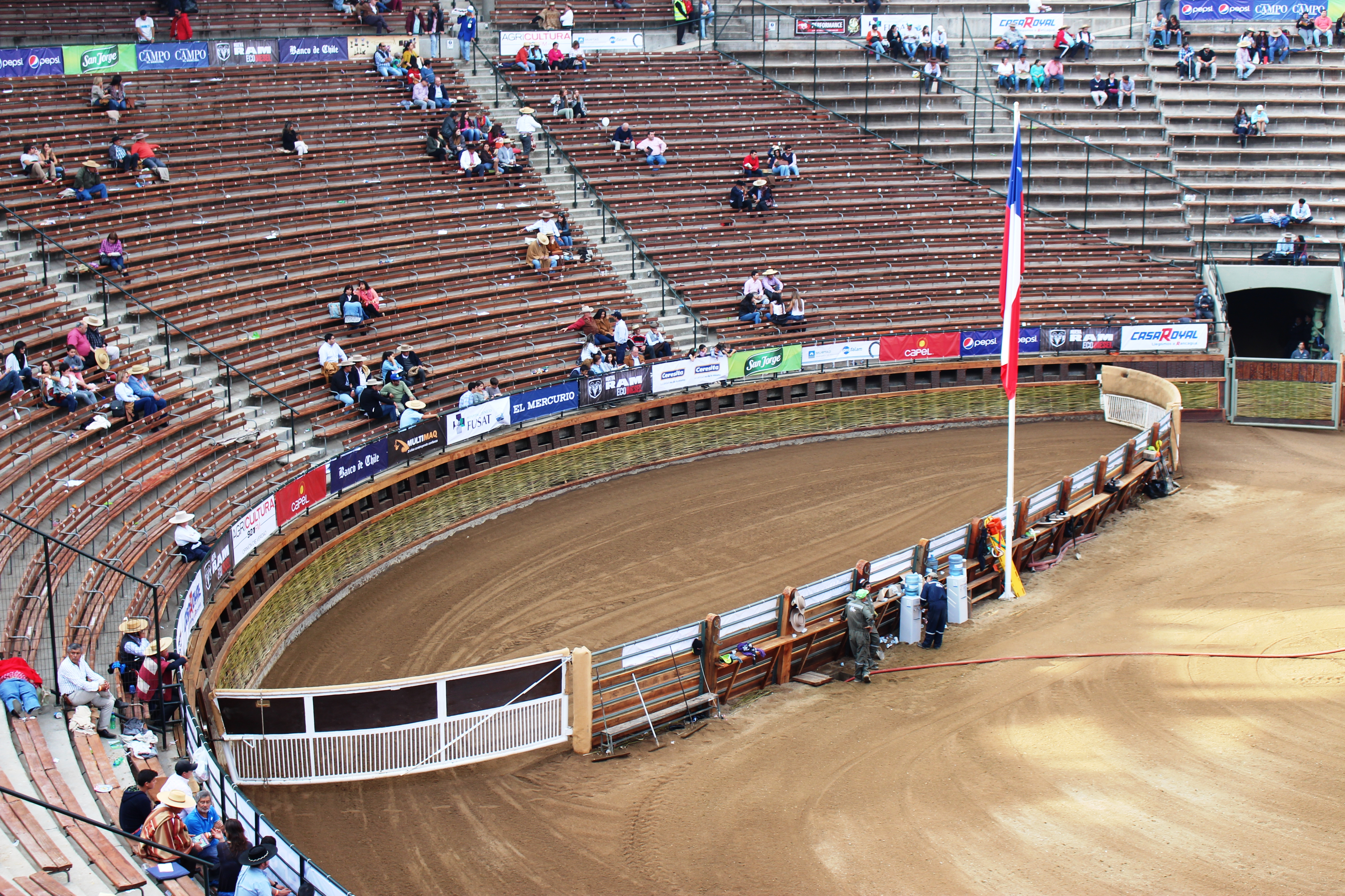 Apiñadero de la Medialuna Monumental de Rancagua, en el Rodeo del año 2016